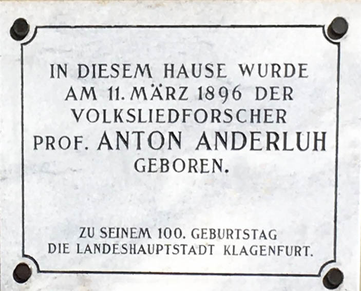 Gedenktafel für Anton Anderluh (1896-1977), Volksmusiksammler; Klagenfurt, Pernhartgasse 4